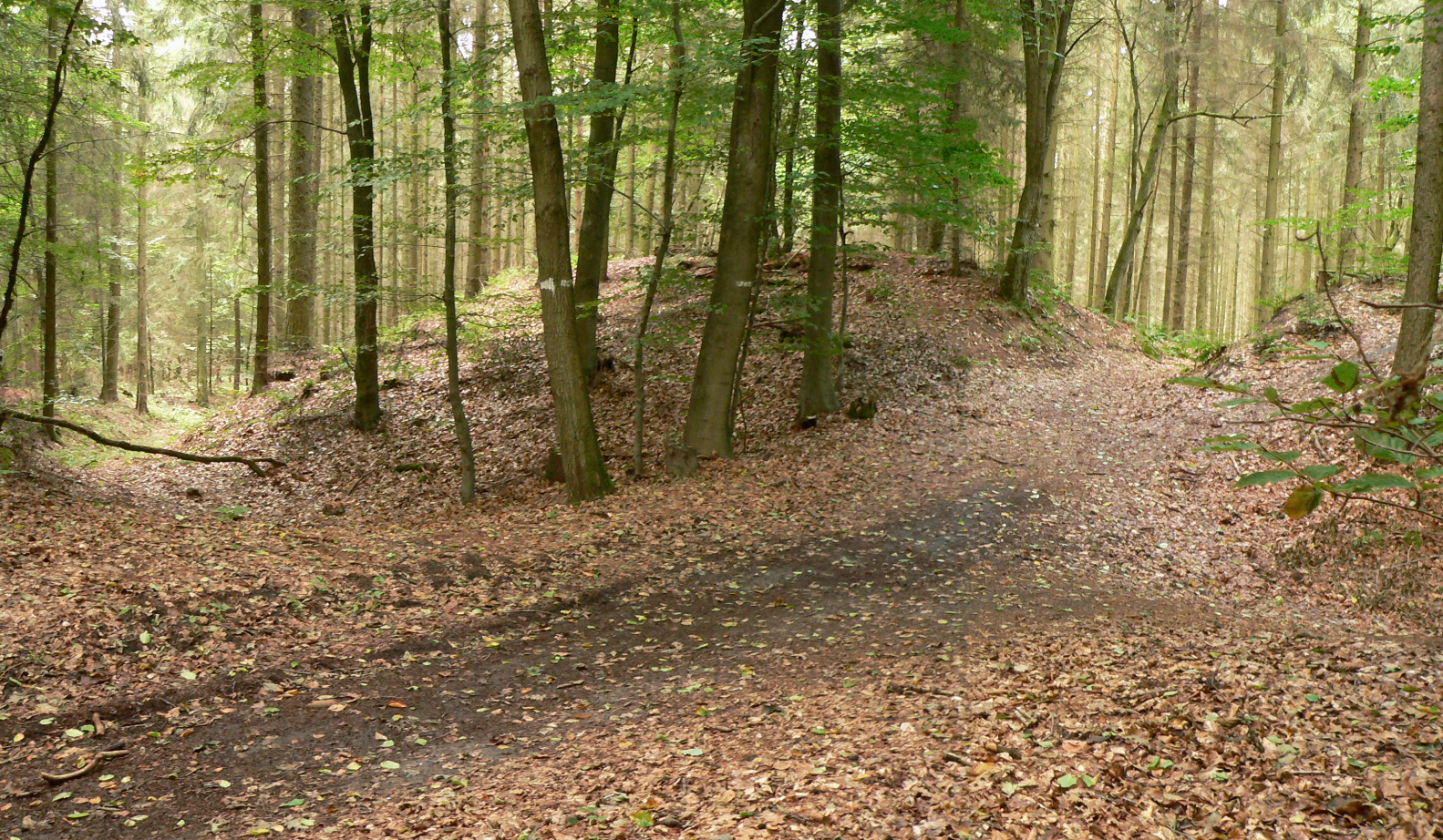 Alte Schanze (Oyle) Durchbruch des Walls in südwestlicher, vermutlich früherer Zugang